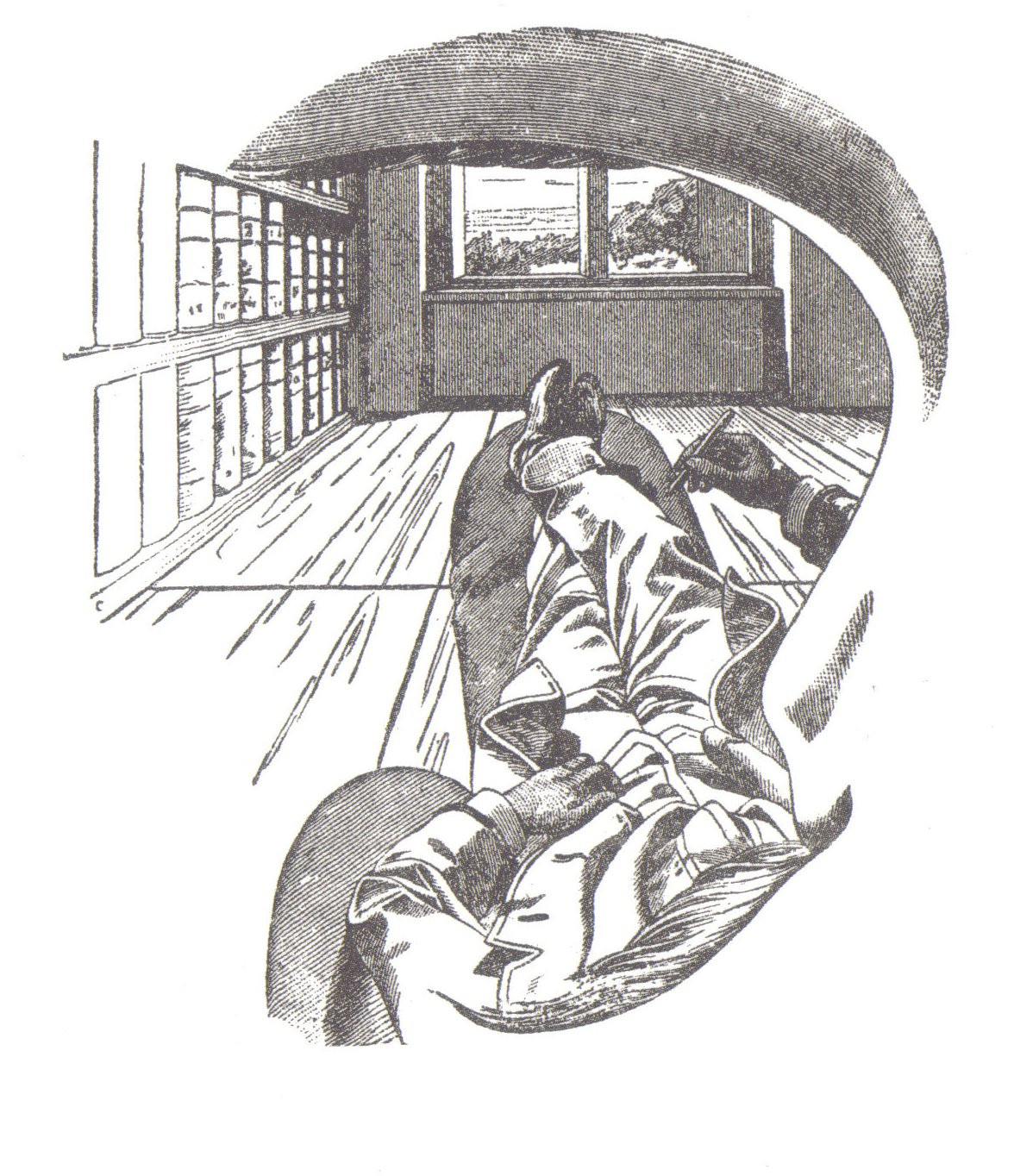 Ernst Mach's drawing.